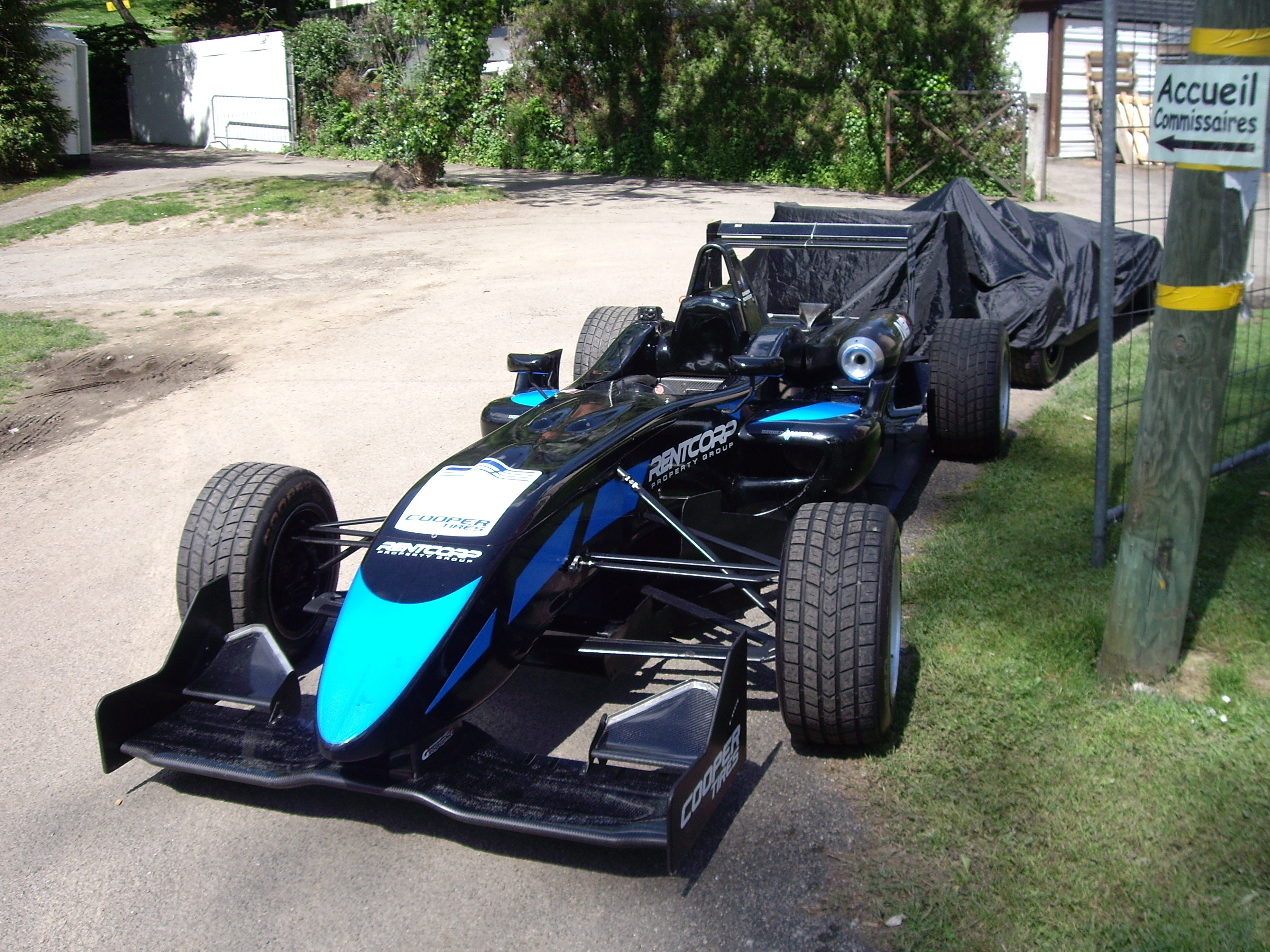 monoplace de Formule 3 au Grand Prix de Pau 2012